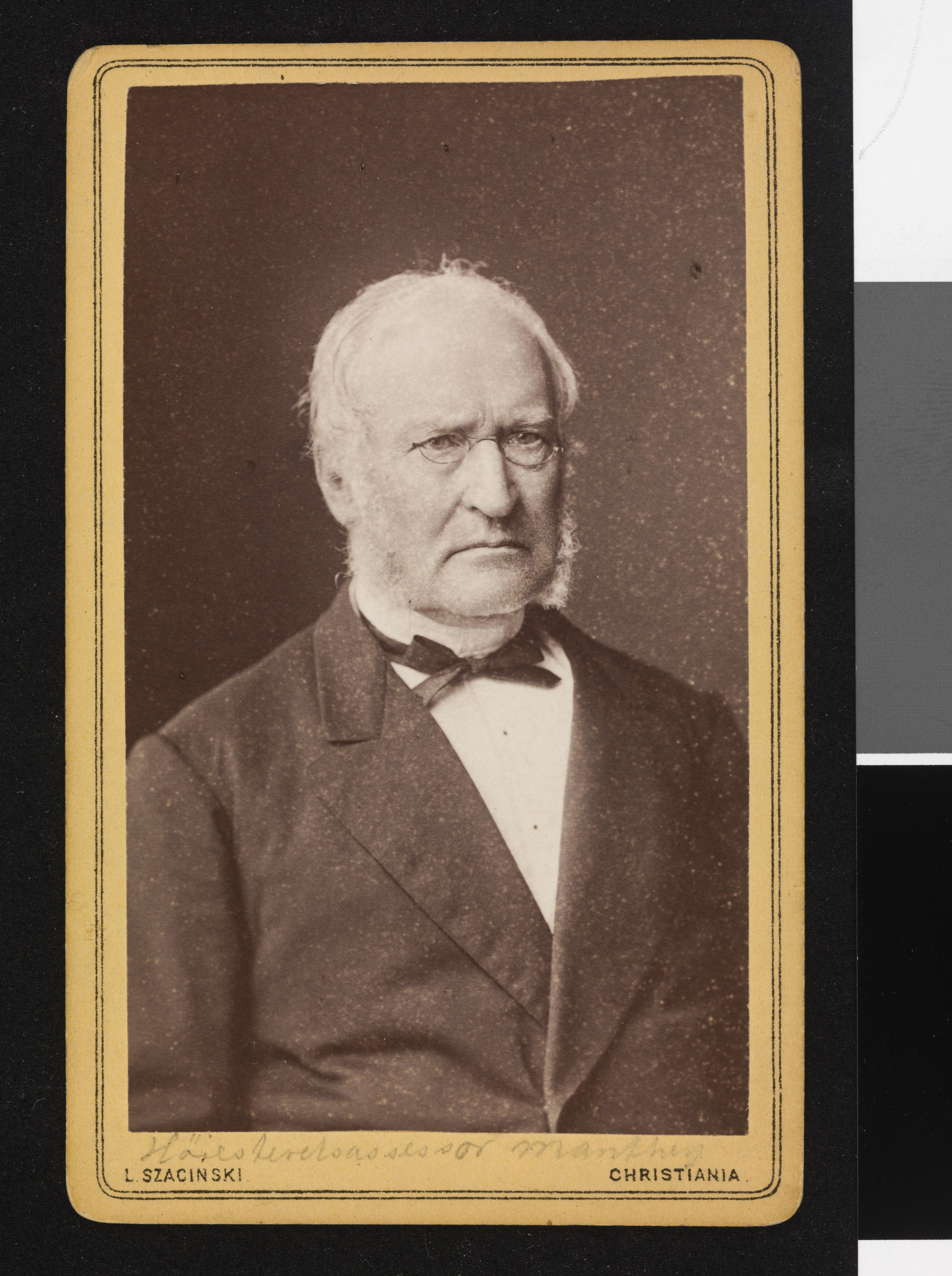 Anton Wilhelm Manthey (f. 30. mai 1807 i Stavanger-d. 28. oktober 1885), norsk jurist, bror av August Christian Manthey. Bildet er hentet fra Nasjonalbibliotekets bildesamling.